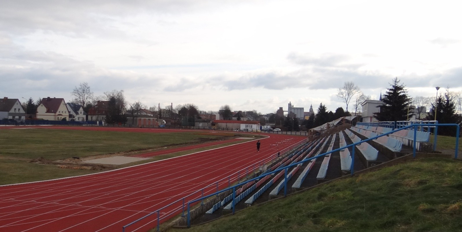 Miejski stadion lekkoatletyczny Stargard